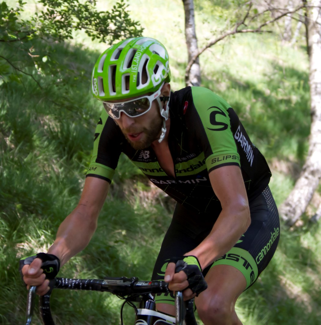 274 hesjedal